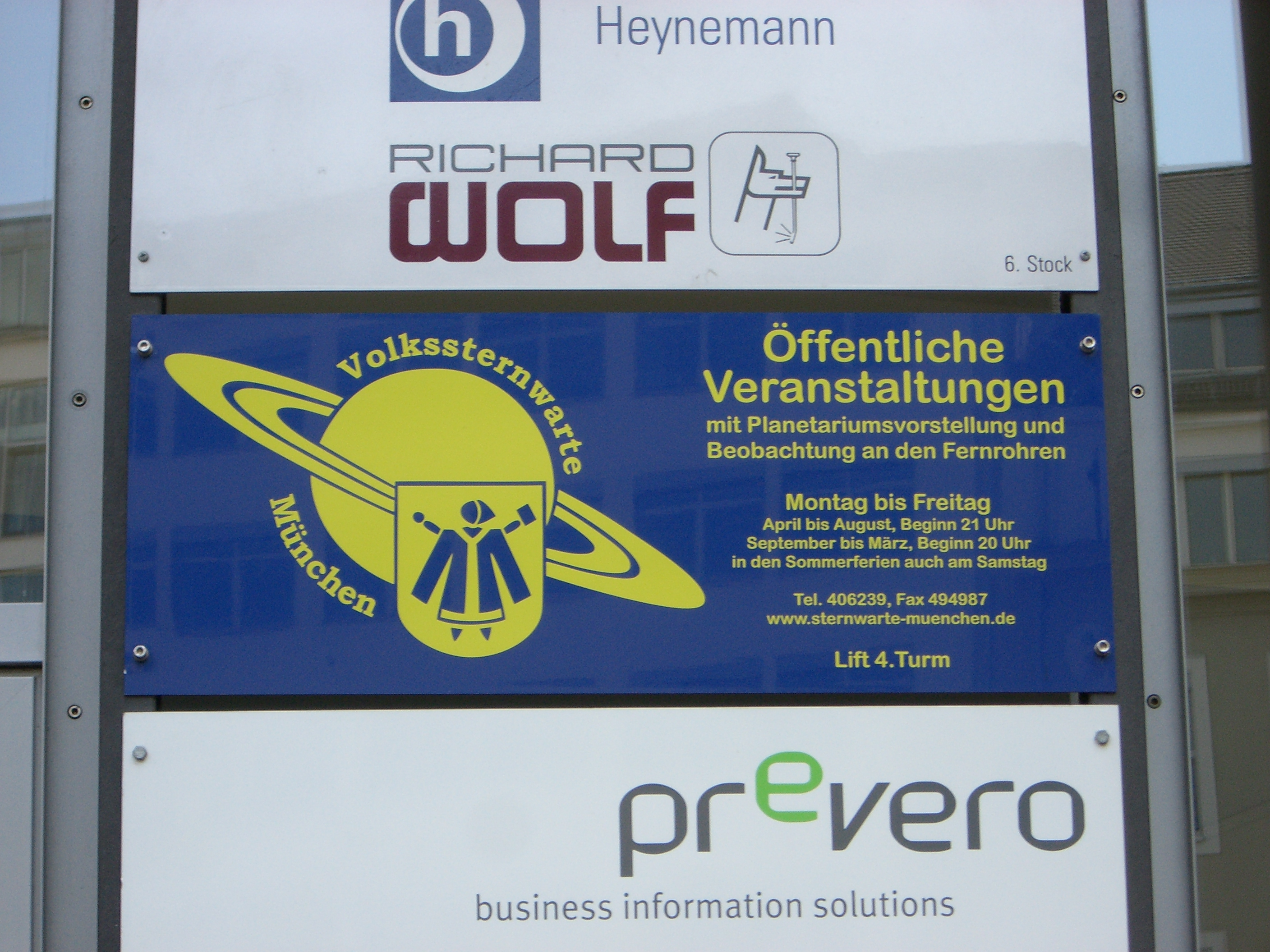 München - Volkssternwarte (Schild)